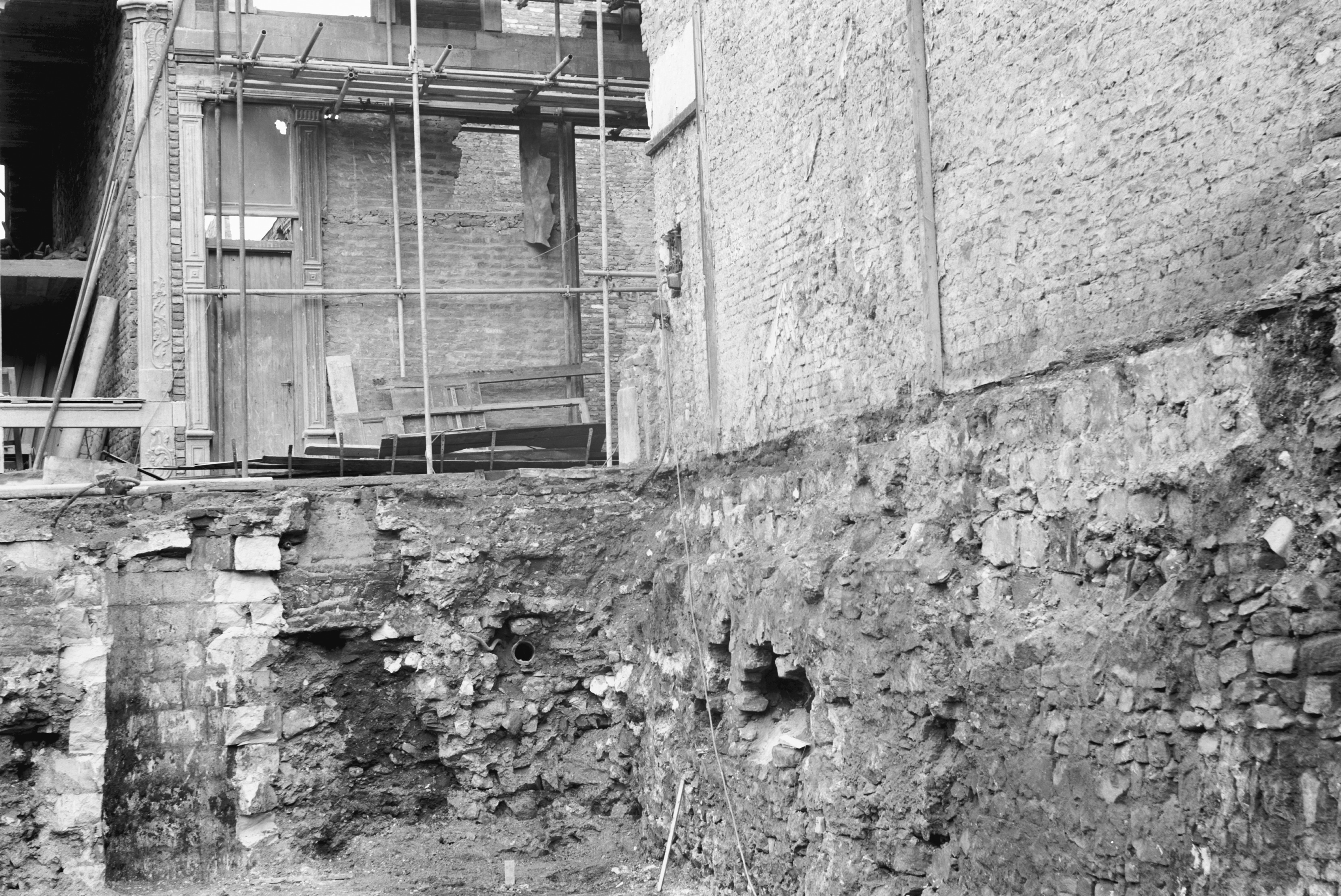 20-18, in de bouwput gezien naar de Stokstraat